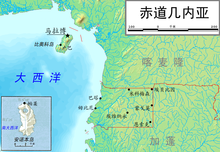 赤道几内亚地图（左下方小插图是安诺本岛）。